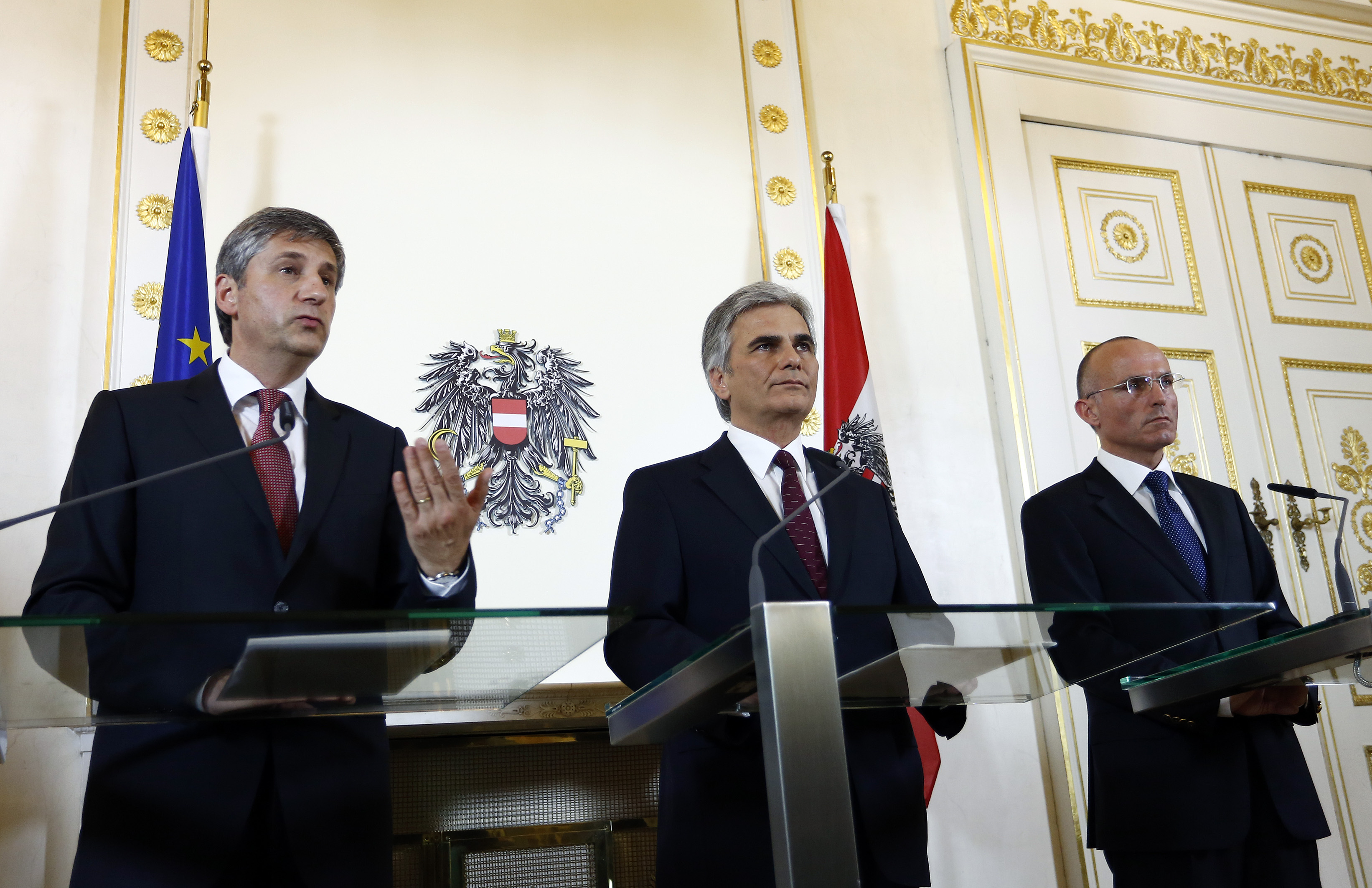 Bundeskanzler Werner Faymann gemeinsam mit Außenminister und Vizekanzler Michael Spindelegger und Verteidigungsminister Gerald Klug (r.) im Rahmen einer Pressekonferenz zum Thema „Abzug der Österreichischen Soldaten vom Golan“. Wien Bundeskanzleramt, 06.06.2013, Foto: Dragan Tatic